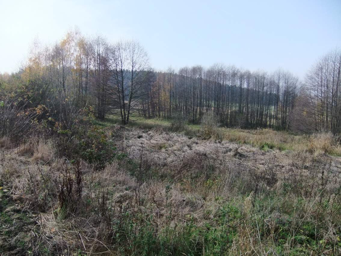 Pramen Řečičky seshora zprava